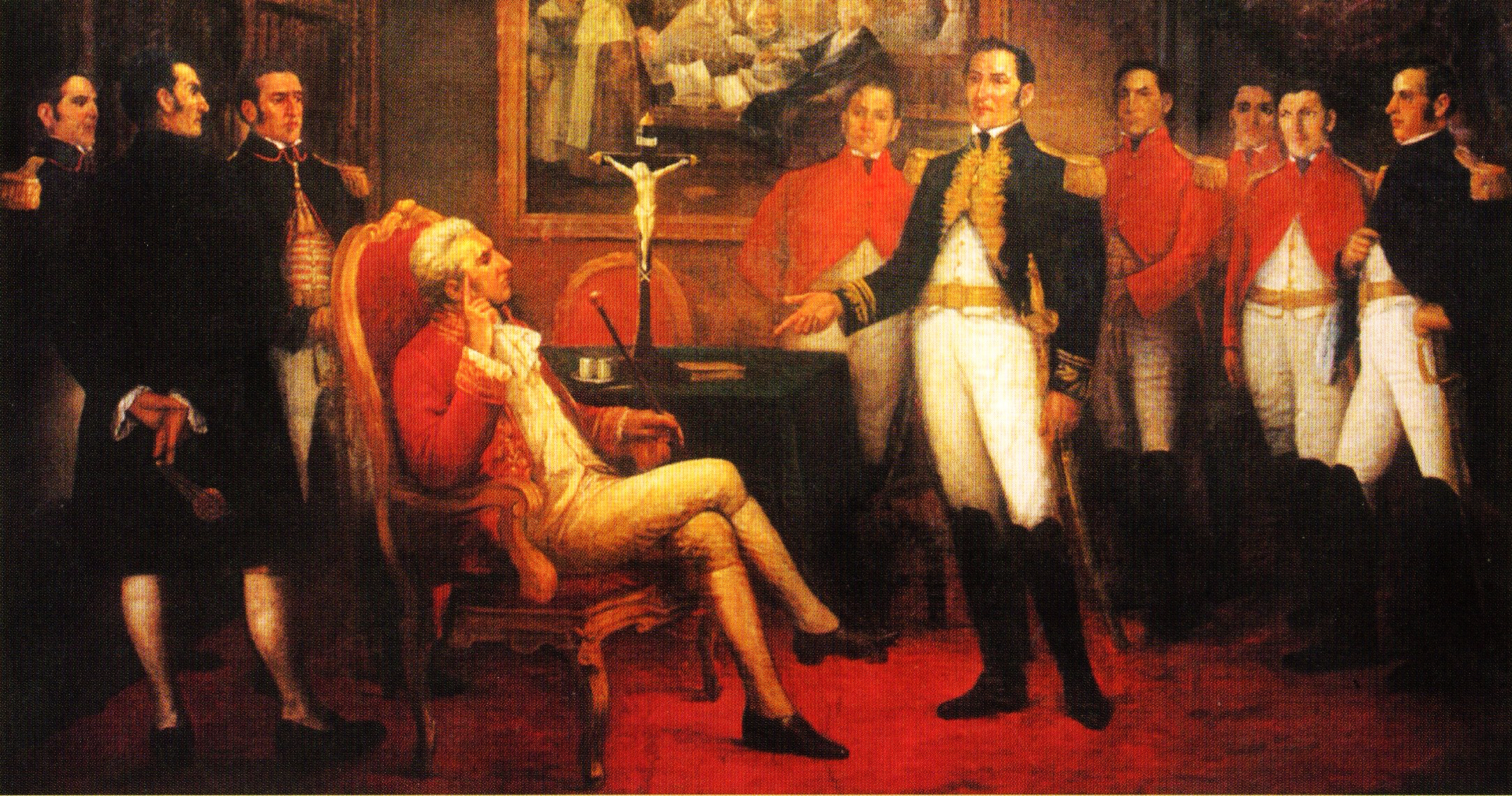 Entrevista de José de San Martín con el virrey José de la Serna en 1820